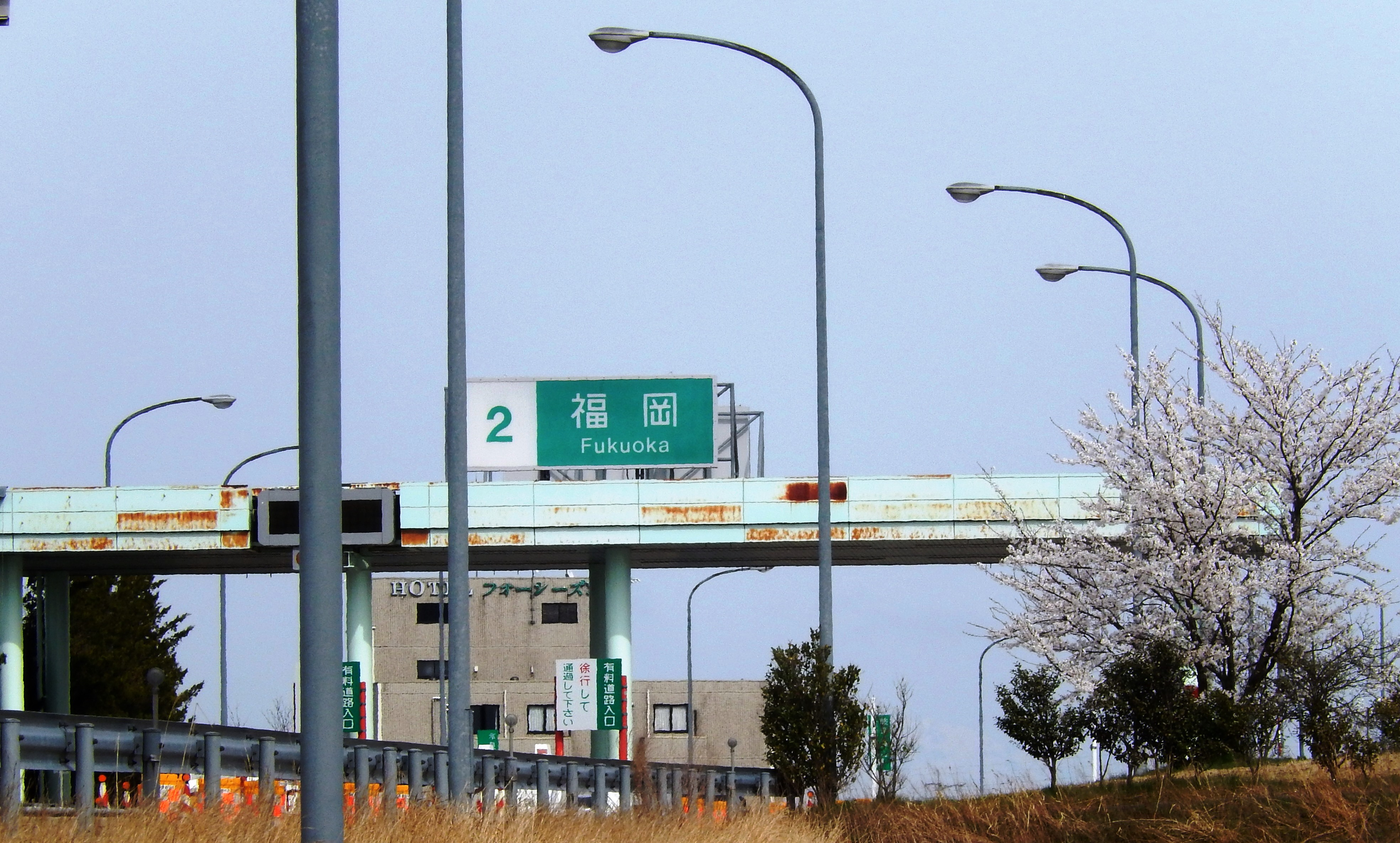 能越自動車道 福岡インター